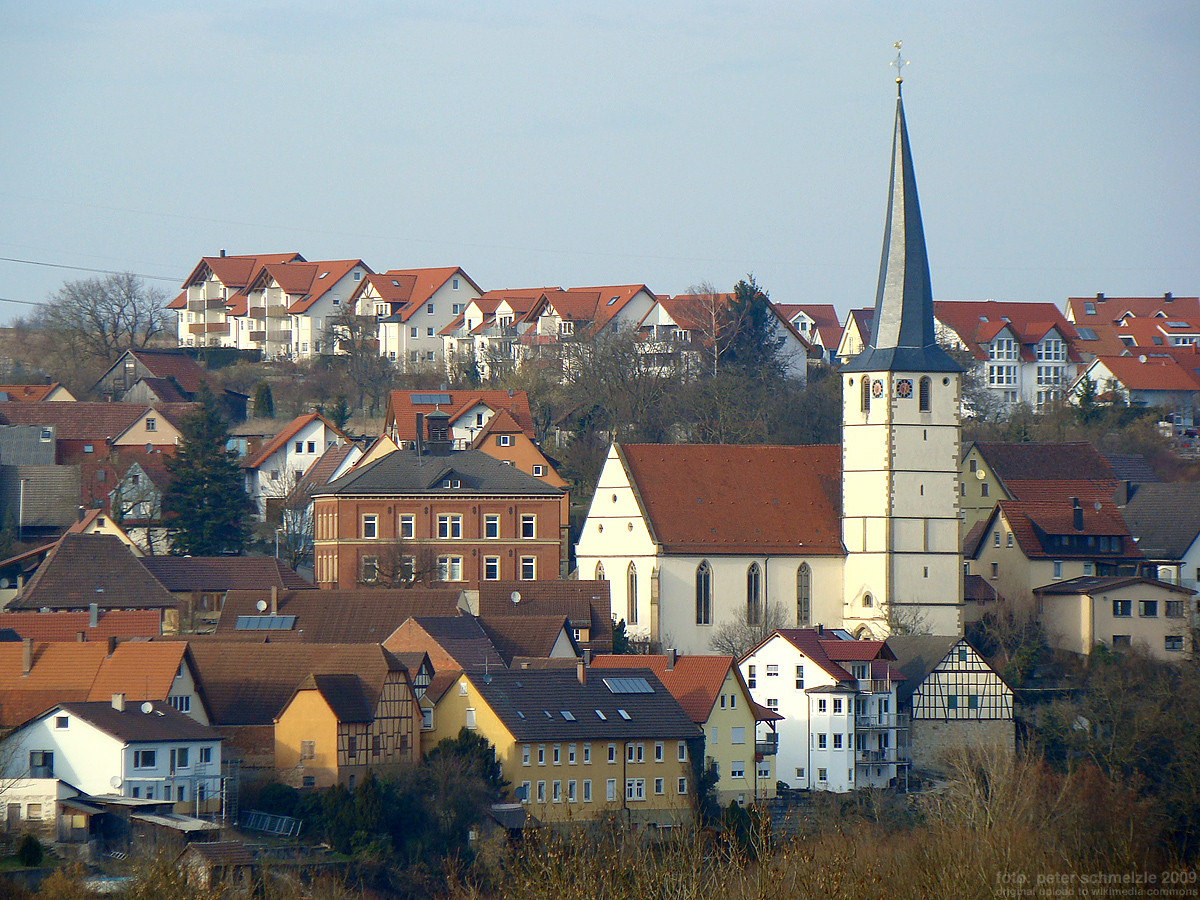 Ortsansicht von Gochsen